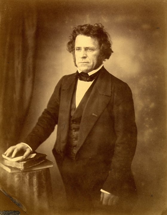 Portrait de Claude Jourdan.